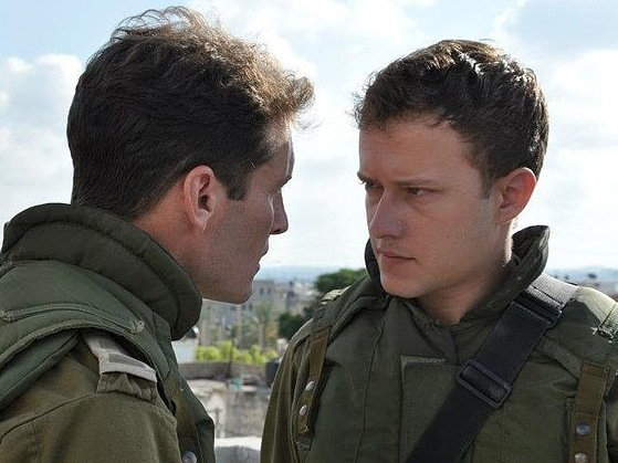 יון תומרקין ואנחל בונני מתוך סרטו של יריב הורוביץ רוק בקסבה